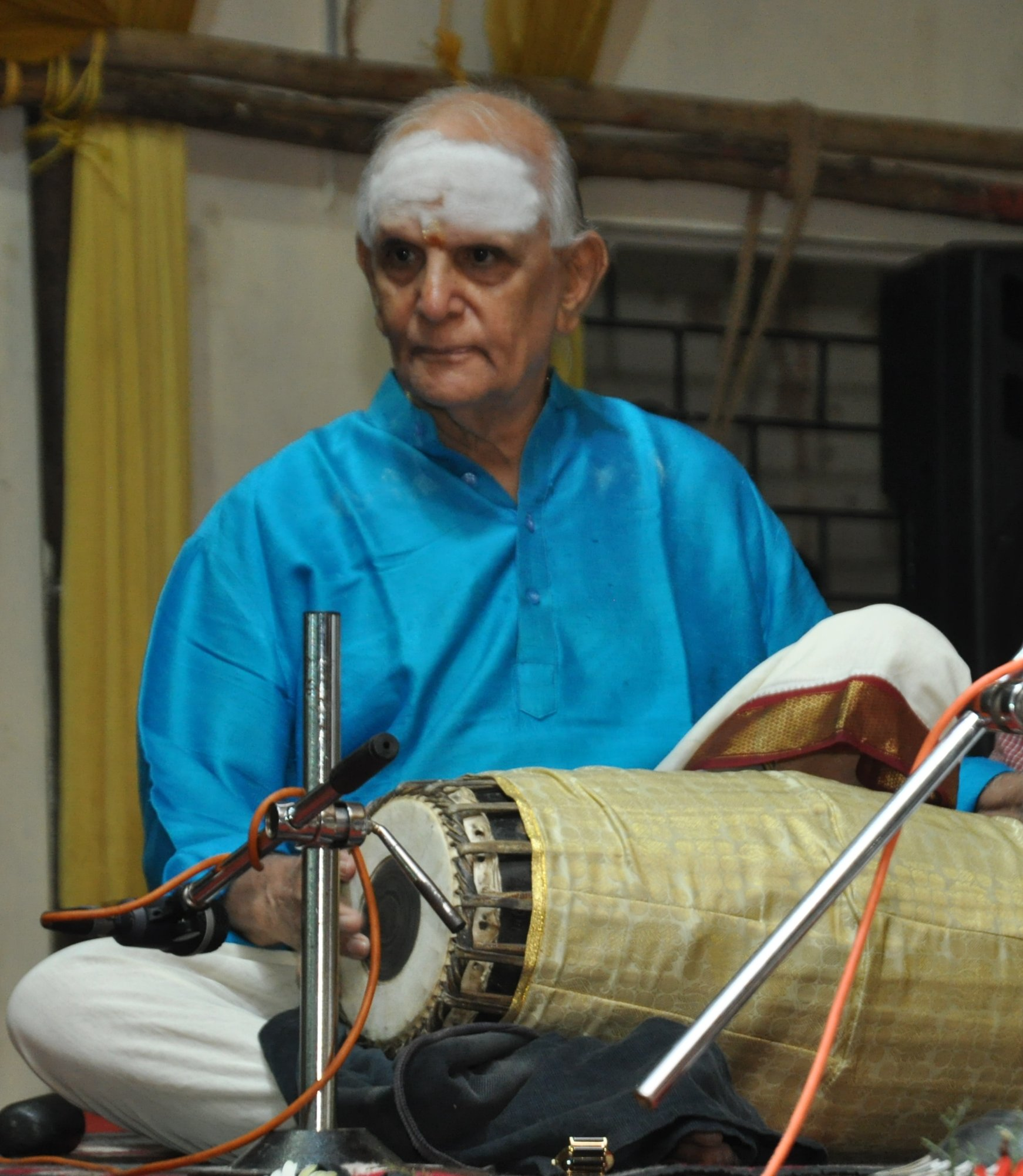 ഉമയാള്‍പുരം കെ. ശിവരാമന്‍